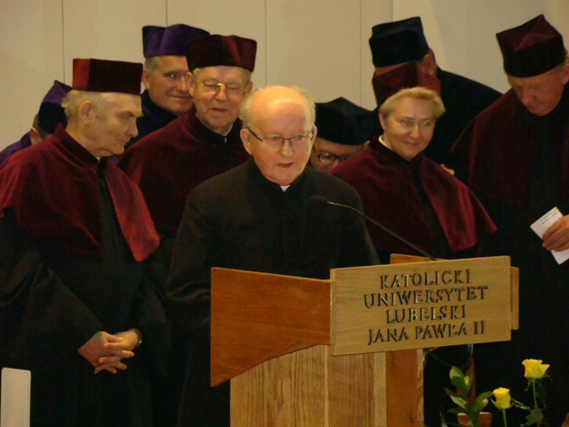 Ks. prof. Bartnik podczas otrzzymana Medalu za zasługi dla KUL